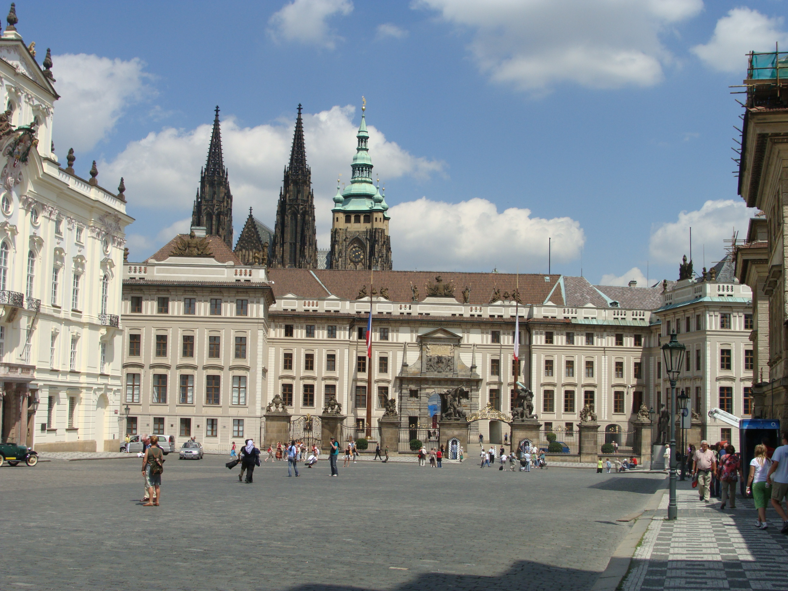 Prag Besuch am 18.06.2009